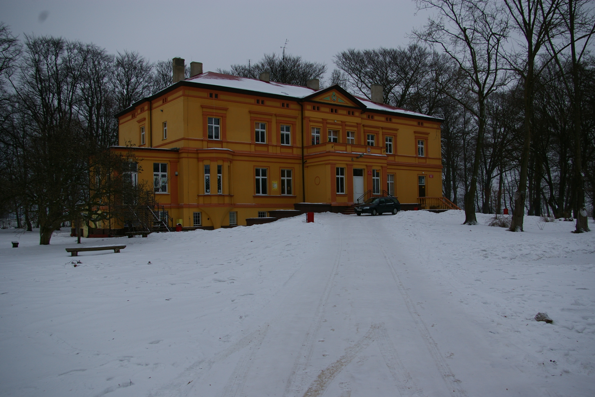 Zabytkowy park pałacowy. W pałacu obecnie szkoła.